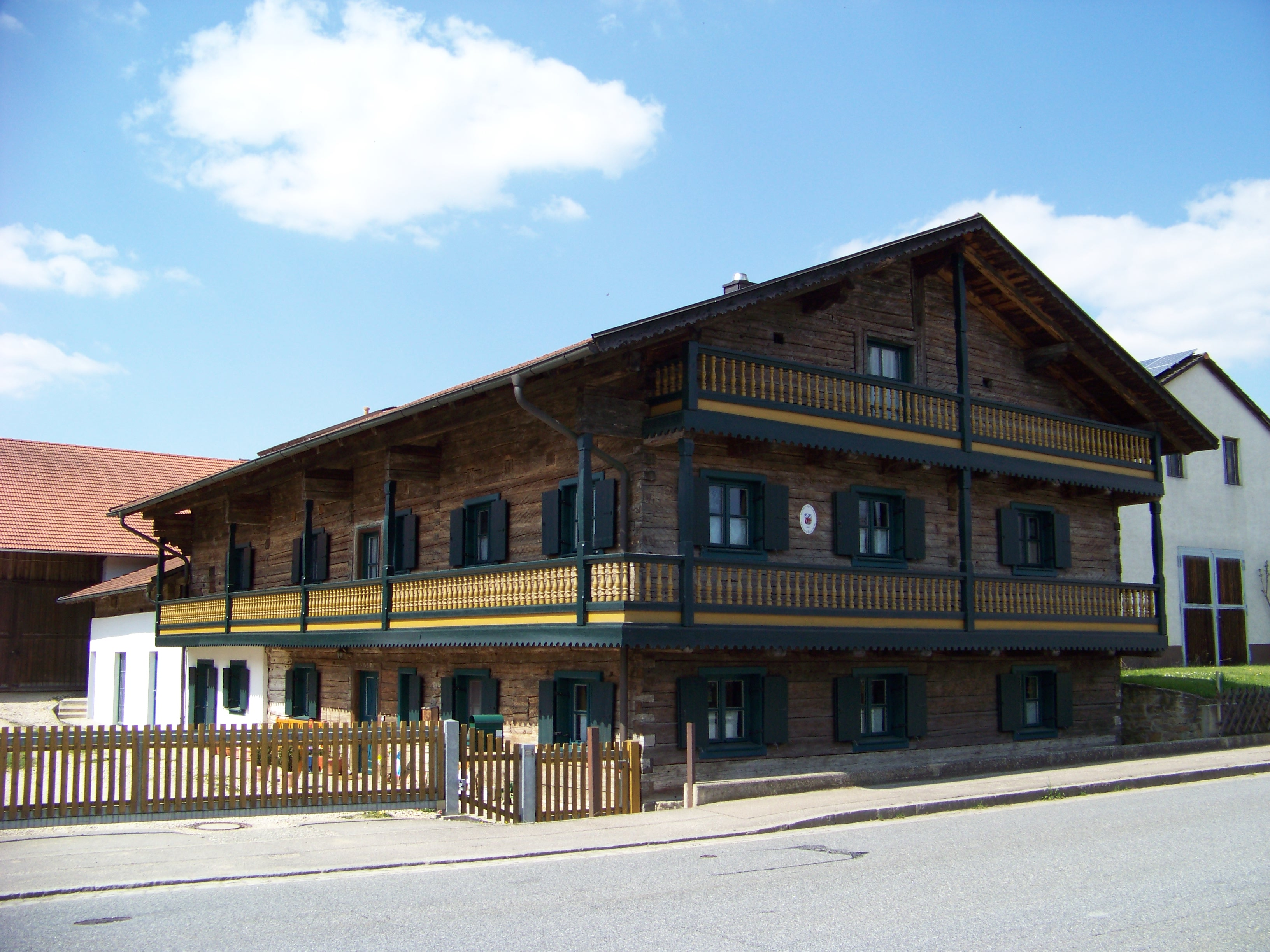 Buchhausen 8. Bauernhaus, zweigeschossiger und giebelständiger Blockbau mit Flachsatteldach und Schroten, im Kern 1599 (dendro.dat.), Umbauten Mitte 19. Jh.